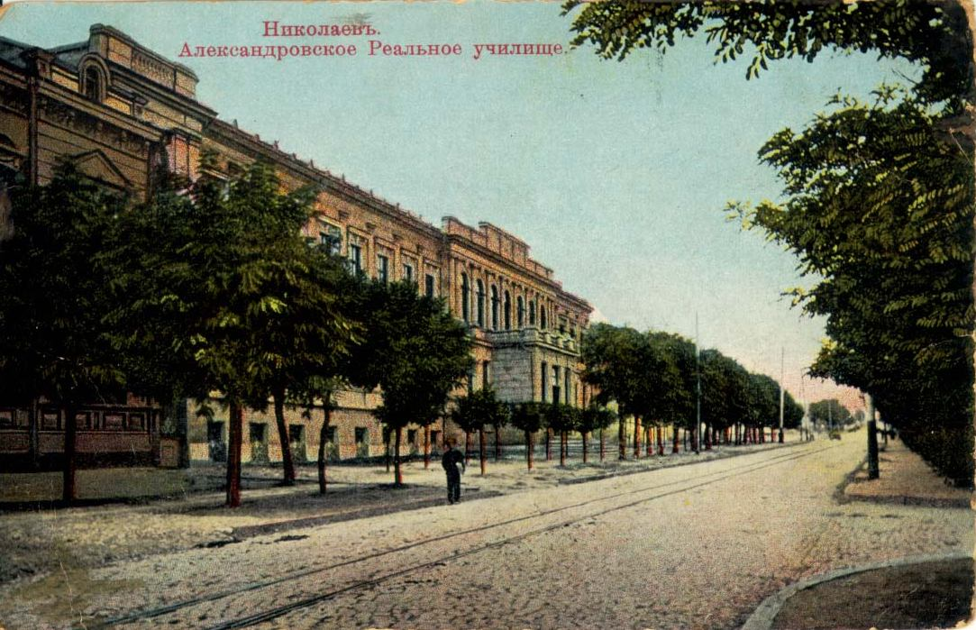 «Николаевъ. Александровское Реальное училище.»